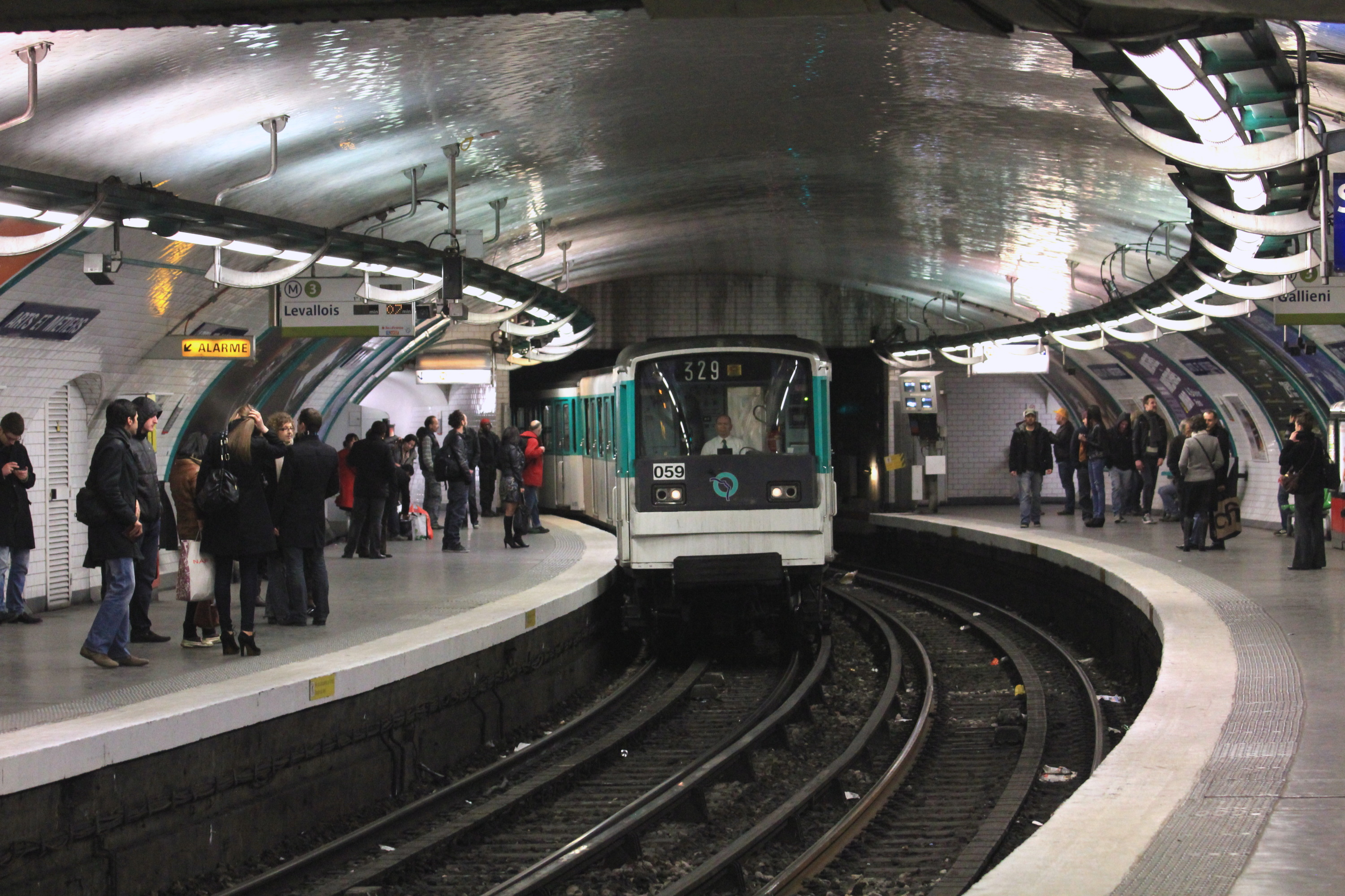 Quais de la station de métro parisien Arts et Métiers de la ligne 3, vus en direction de Gallineni, avec l'arrivée à quai d'un MF 67.